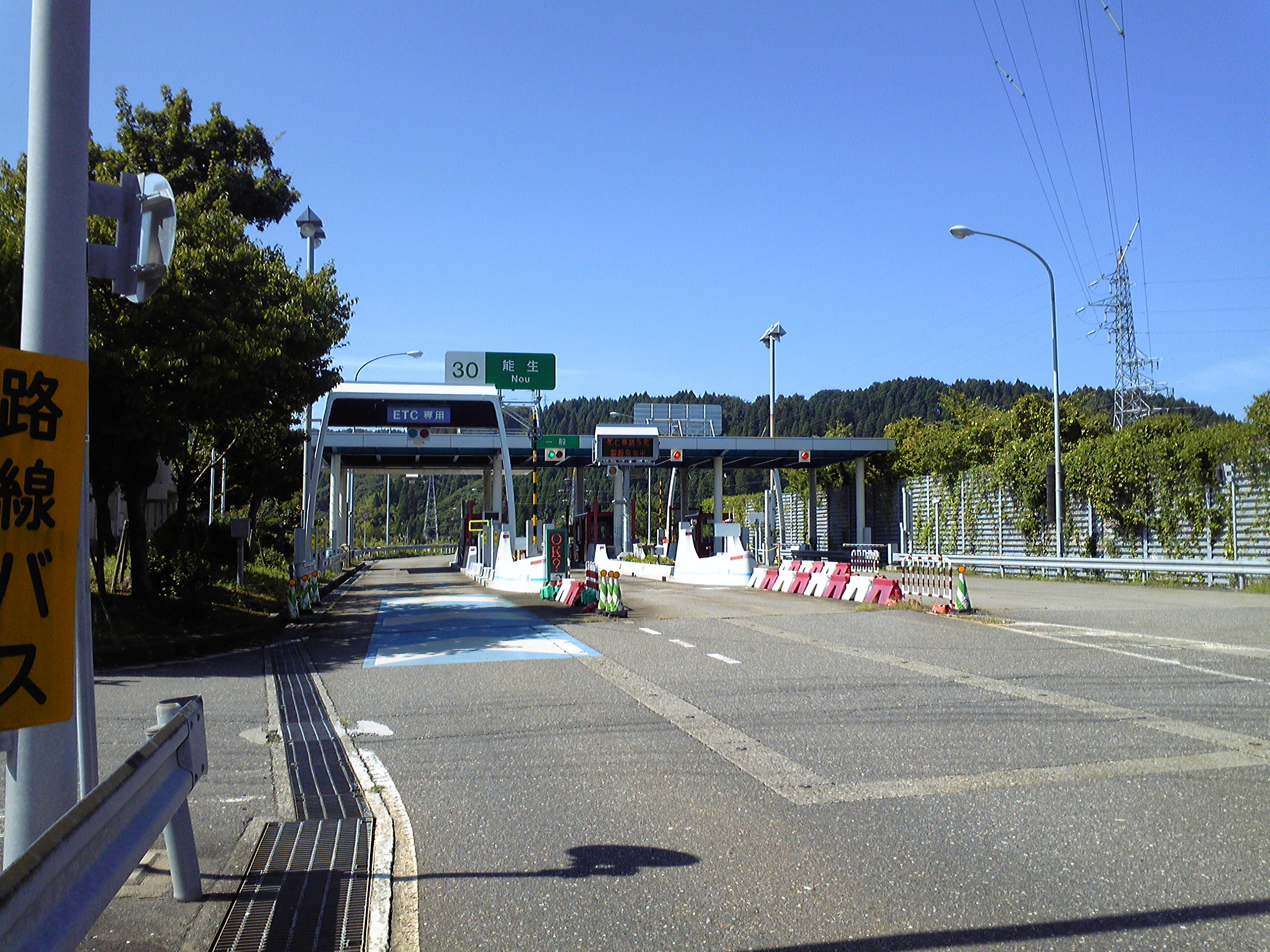 北陸自動車道能生インターチェンジ料金所。